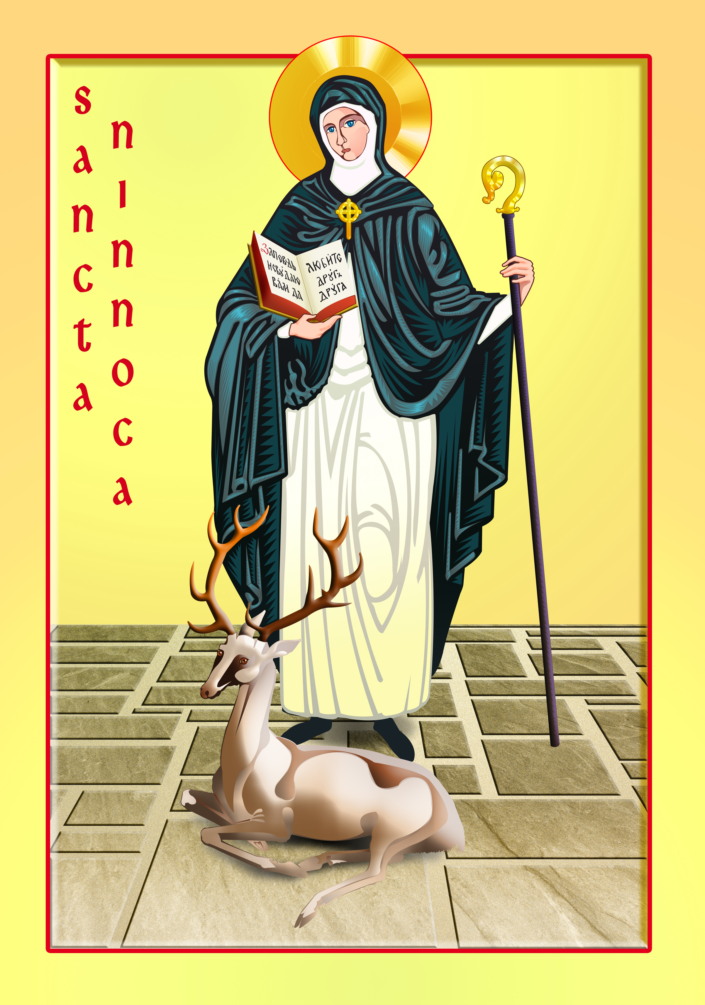 Icône numérique de Sainte Ninnoc réalisée sur Creative Suite cs2